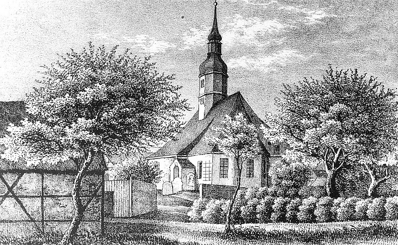 Original image description from the Deutsche Fotothek Triebischtal-Tanneberg. Kirche